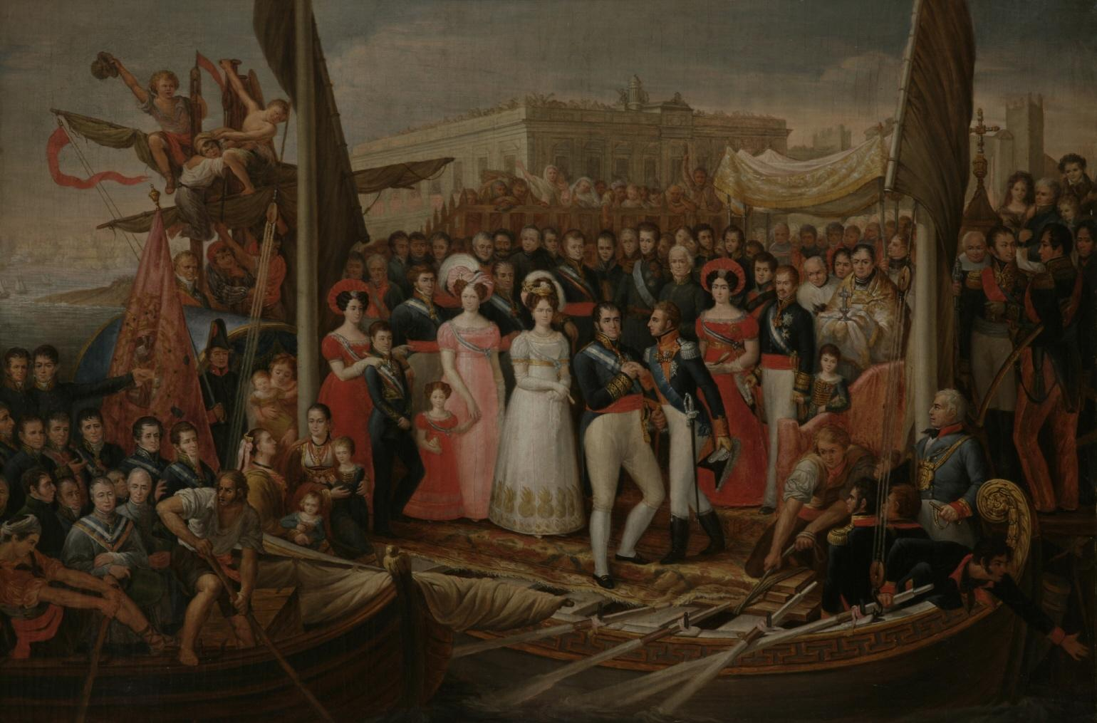 El lienozo representa el desembarco del rey Fernando VII de España (1784-1833), en el municipio de Puerto de Santa María, situado en la provincia de Cádiz, (España).